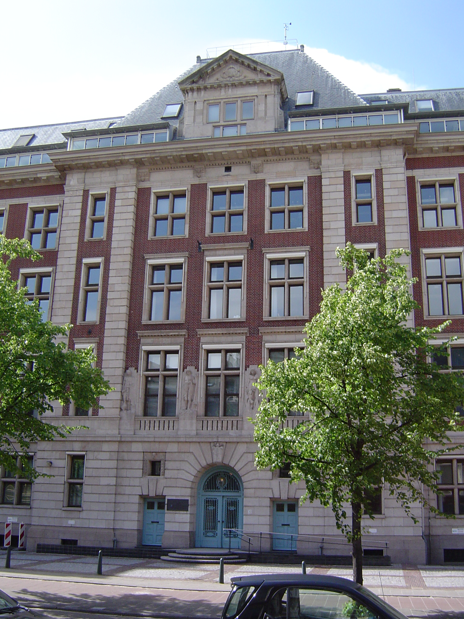 Ministerie van Economische Zaken, The Hague, Holland